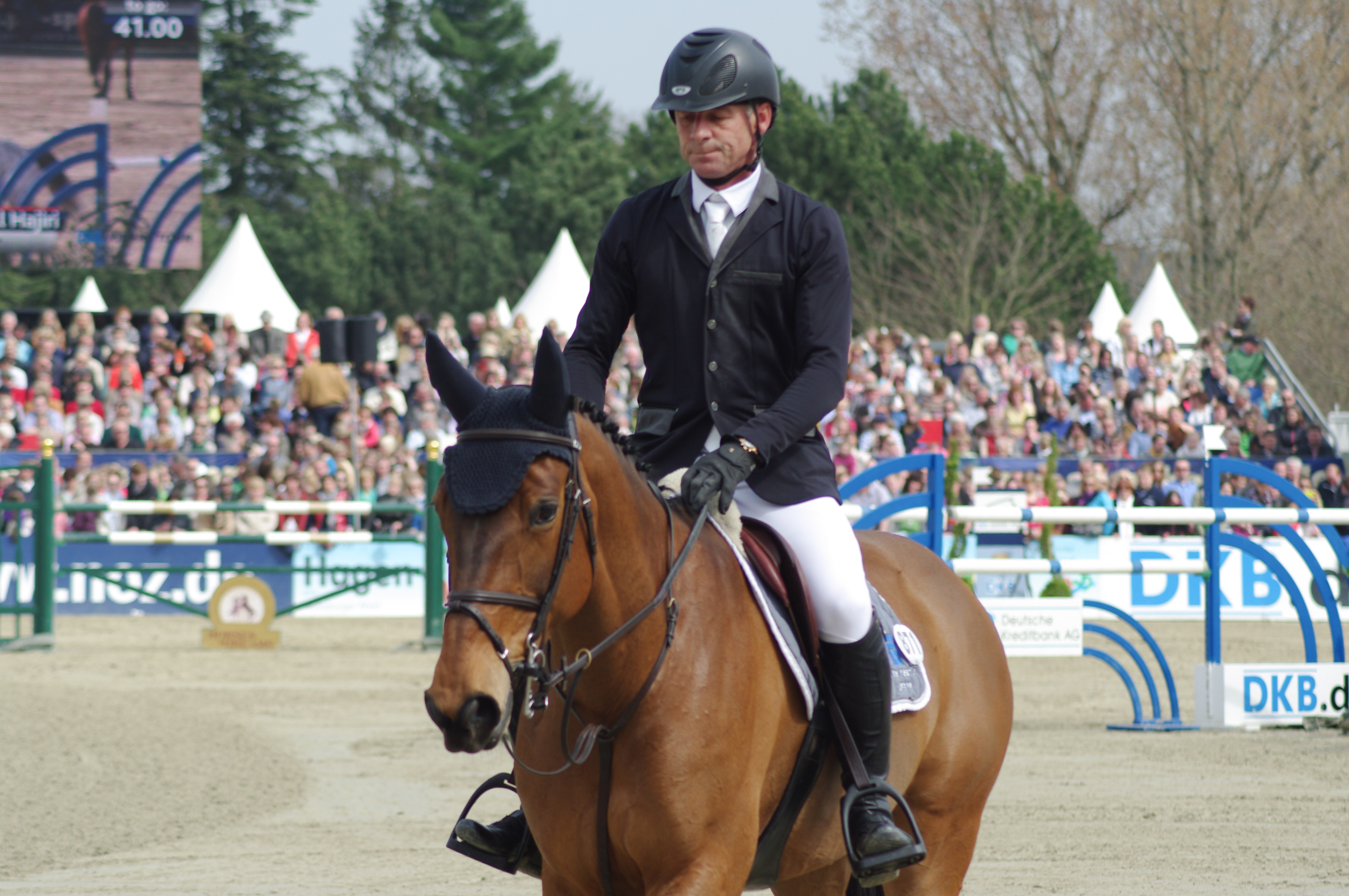 Horses & Dreams 2013: Paul Estermann mit "Castlefield Eclipse